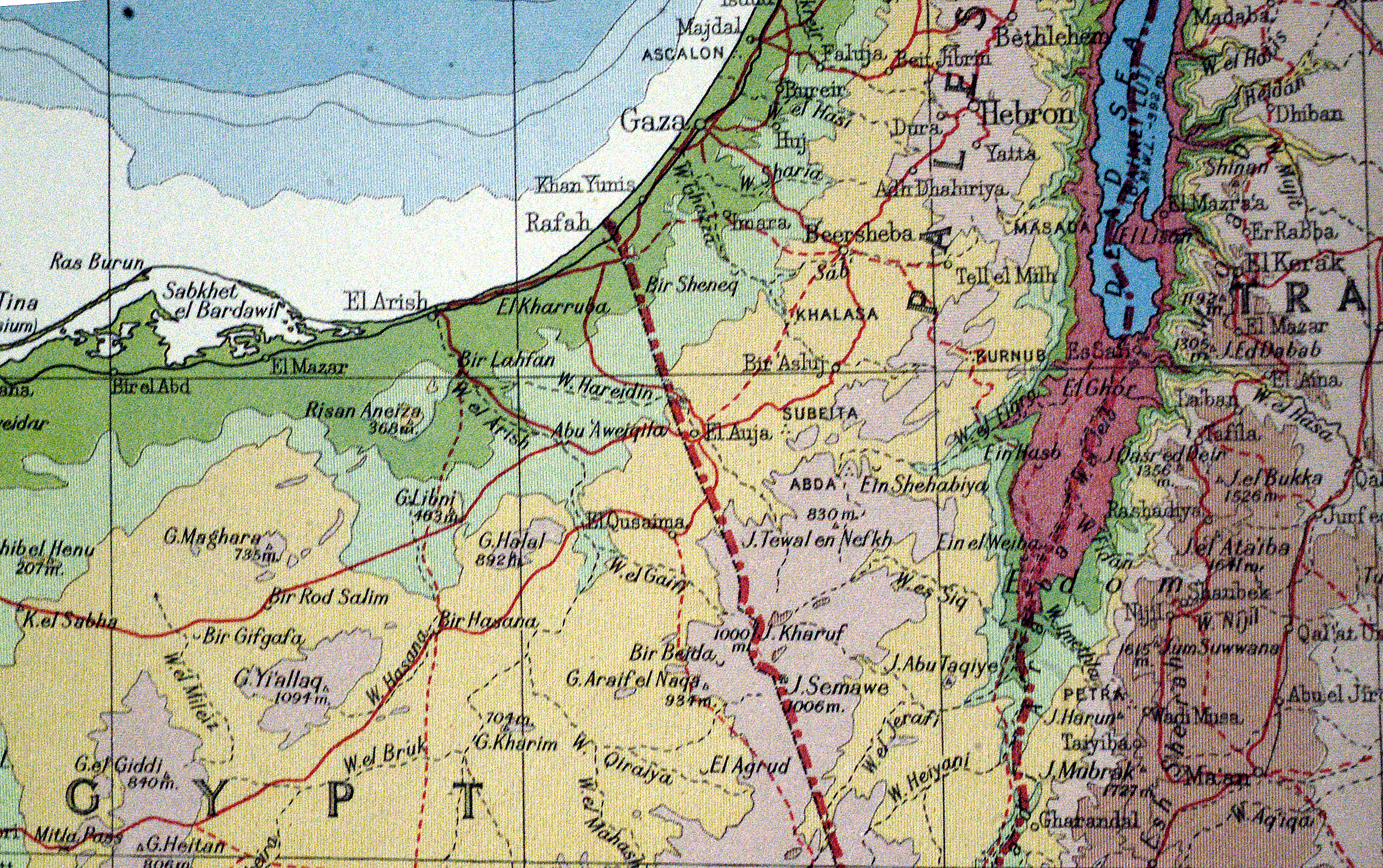 Al Auja